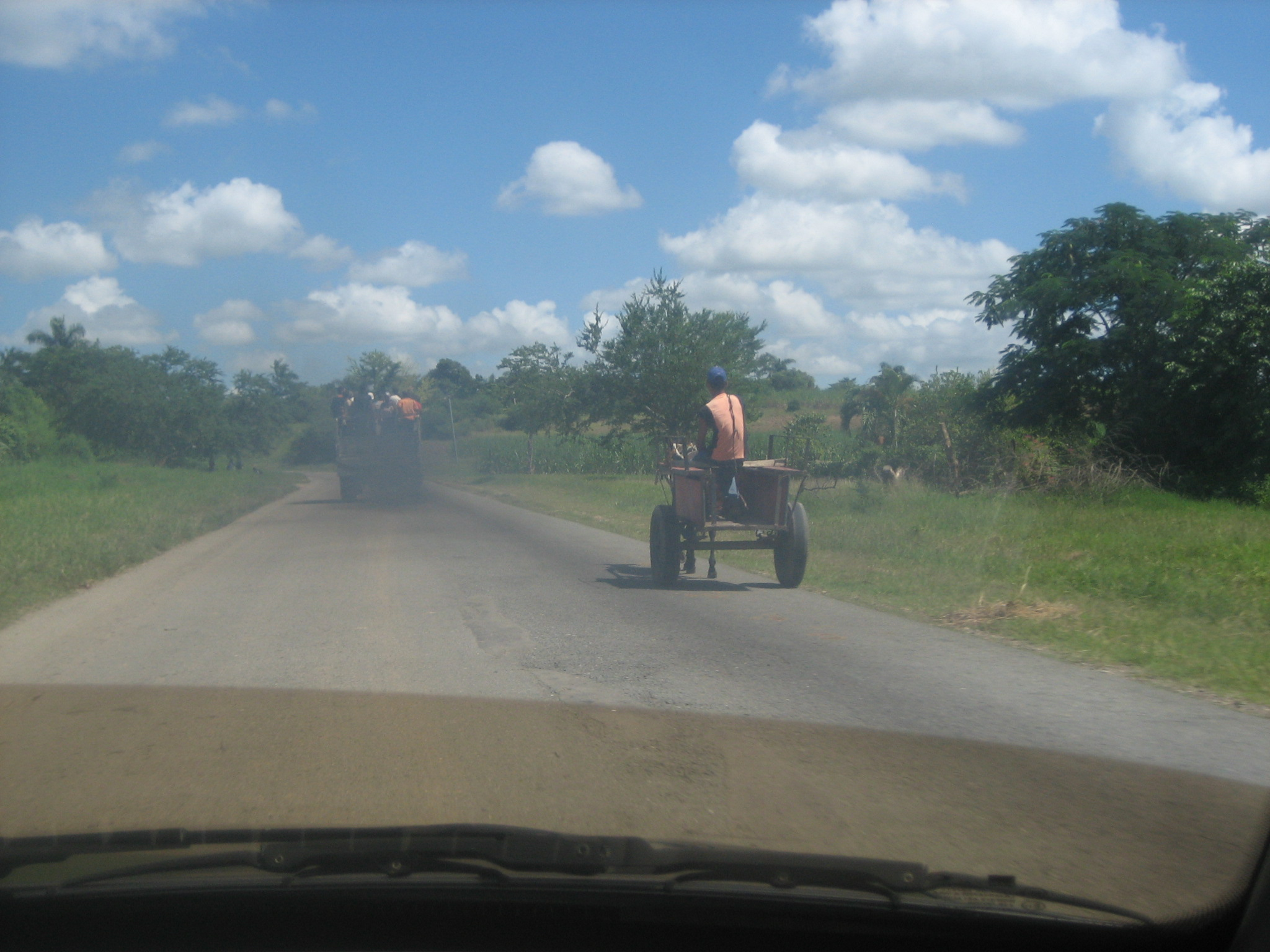 Typische Verkehrsszene auf einer Landstraße zwischen Santiago de Cuba und Holguín (2008)